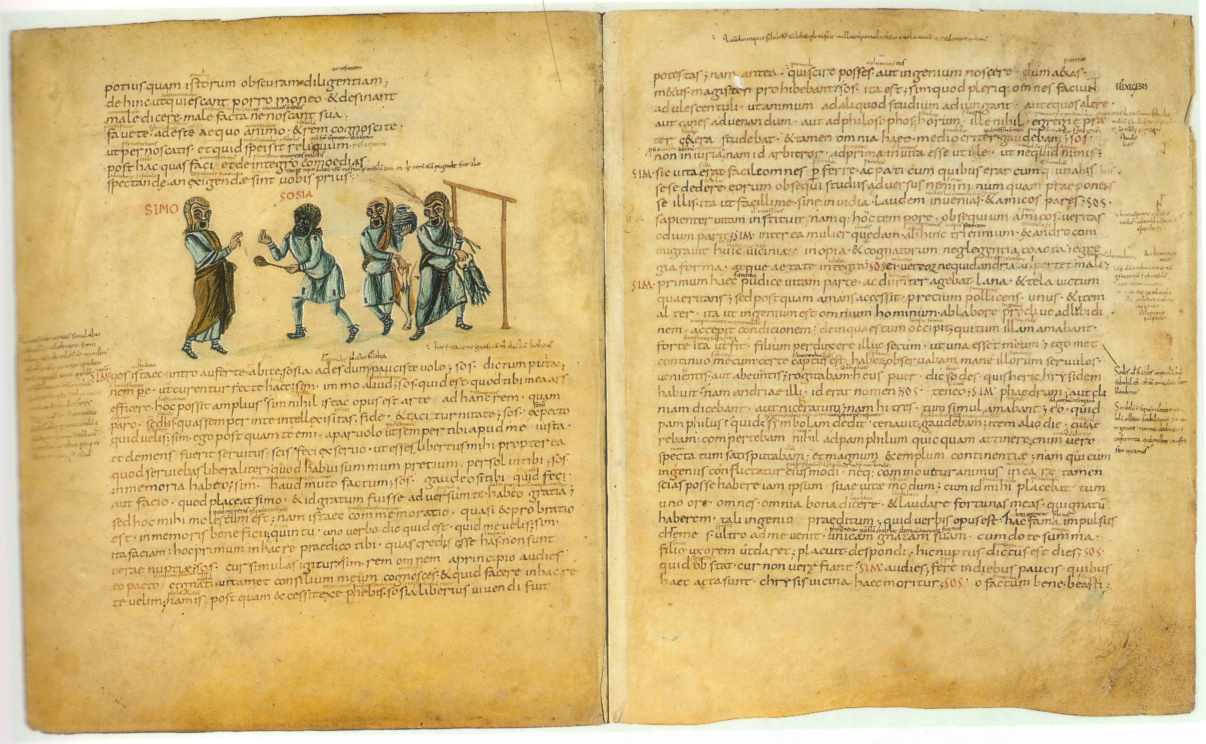 Vaticana, Vat. lat. 3868 (4v/5r) Lotharingien (Aachen?), um 825 Komödienfiguren